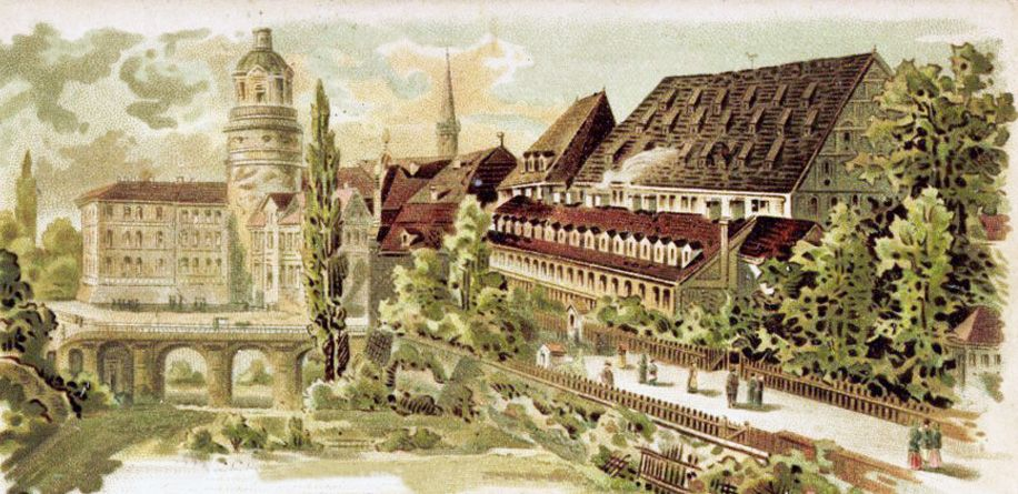 Das Südende der Altstadt von Leipzig um 1850 mit Kornhaus (rechts) neben Alter Peterskirche, Peterstor und Pleißenburg